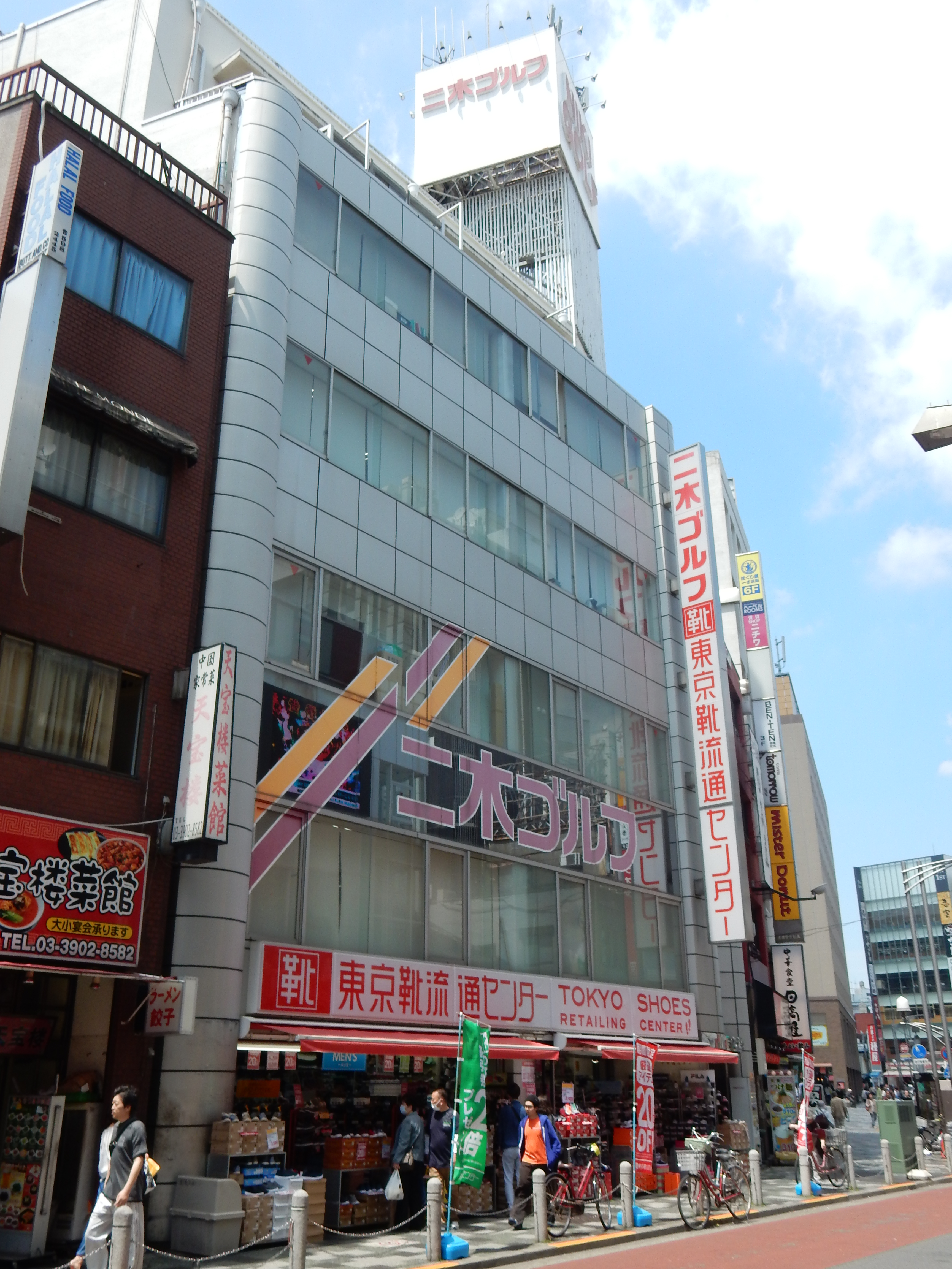 二木ゴルフ営業本部。東京都北区赤羽一丁目1番6号